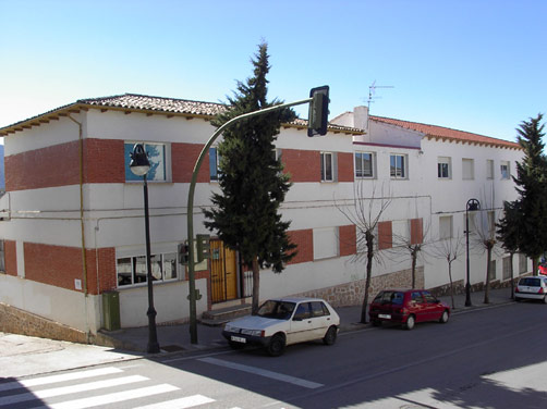 Acceso principal al Centro del Profesorado de Orcera